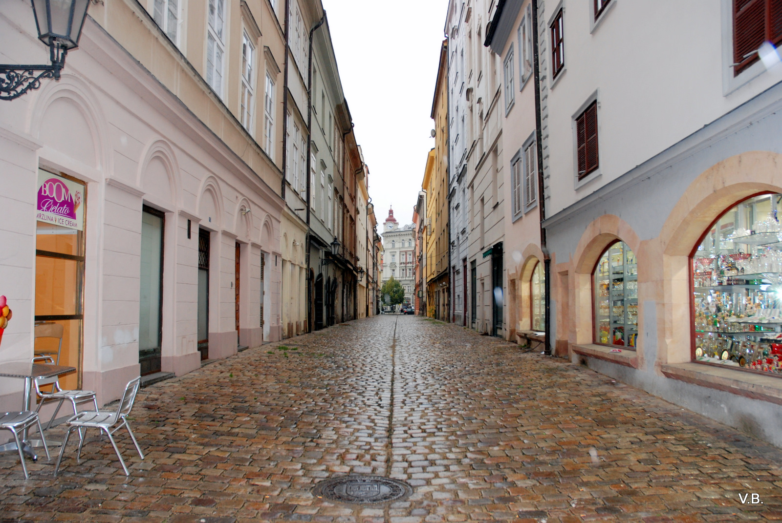 Уголок Праги. Фото Виктора Белоусова.